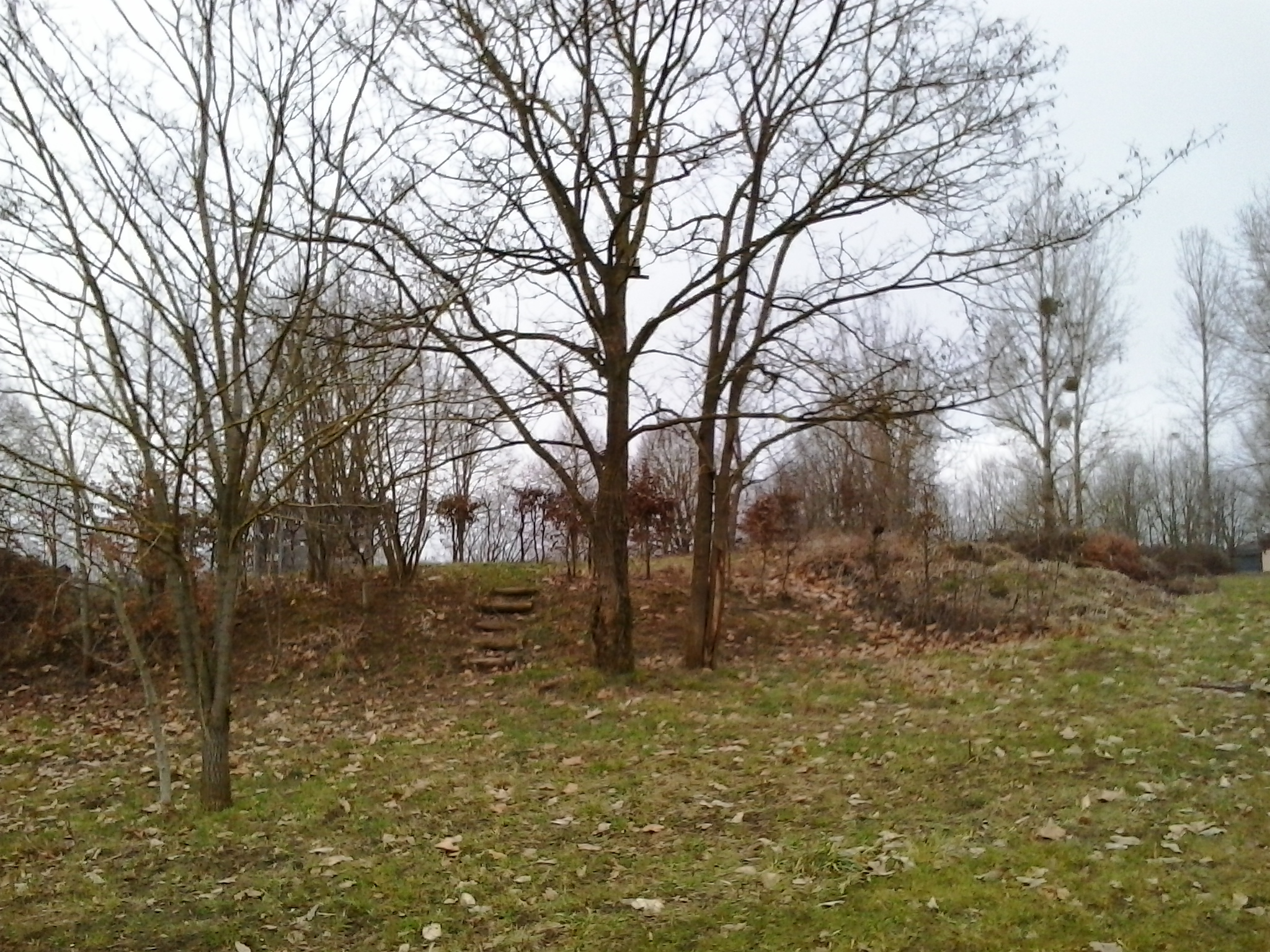 Arboretum des Sarteaux, Ville sur Lumes